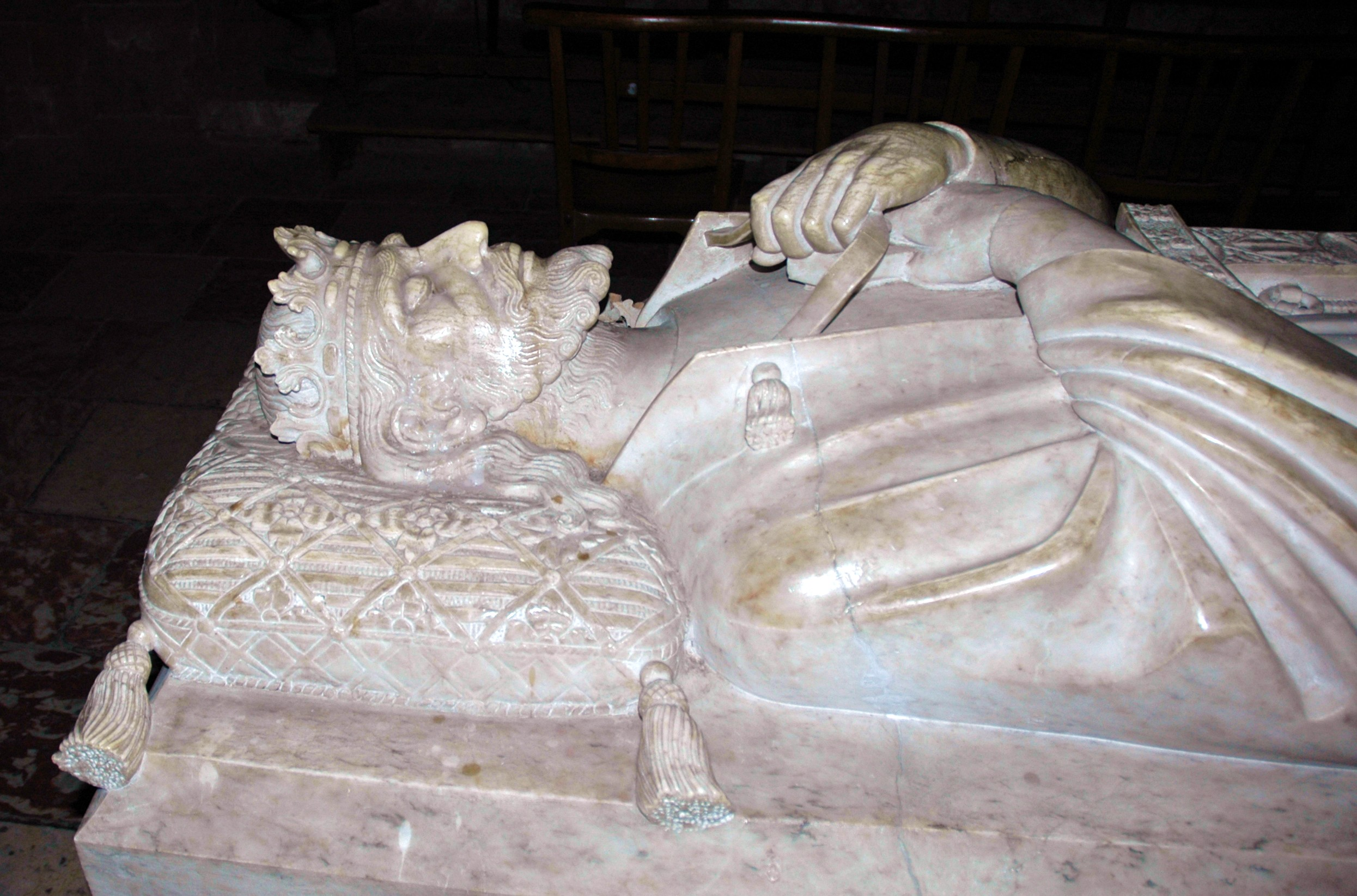 Sanç I de Mallorca - Catedral de Perpinyà